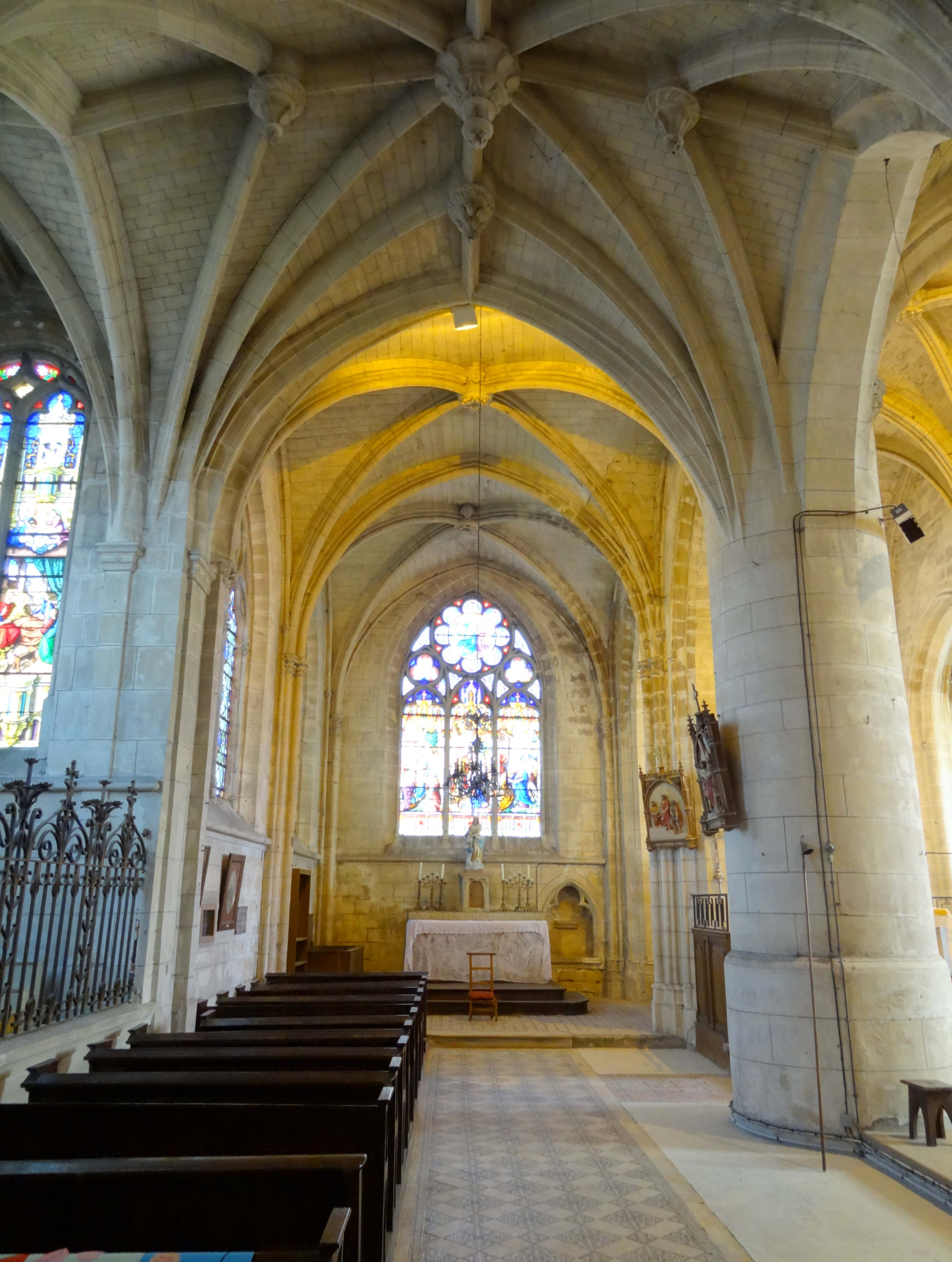 Intérieur de l'église - voir titre.